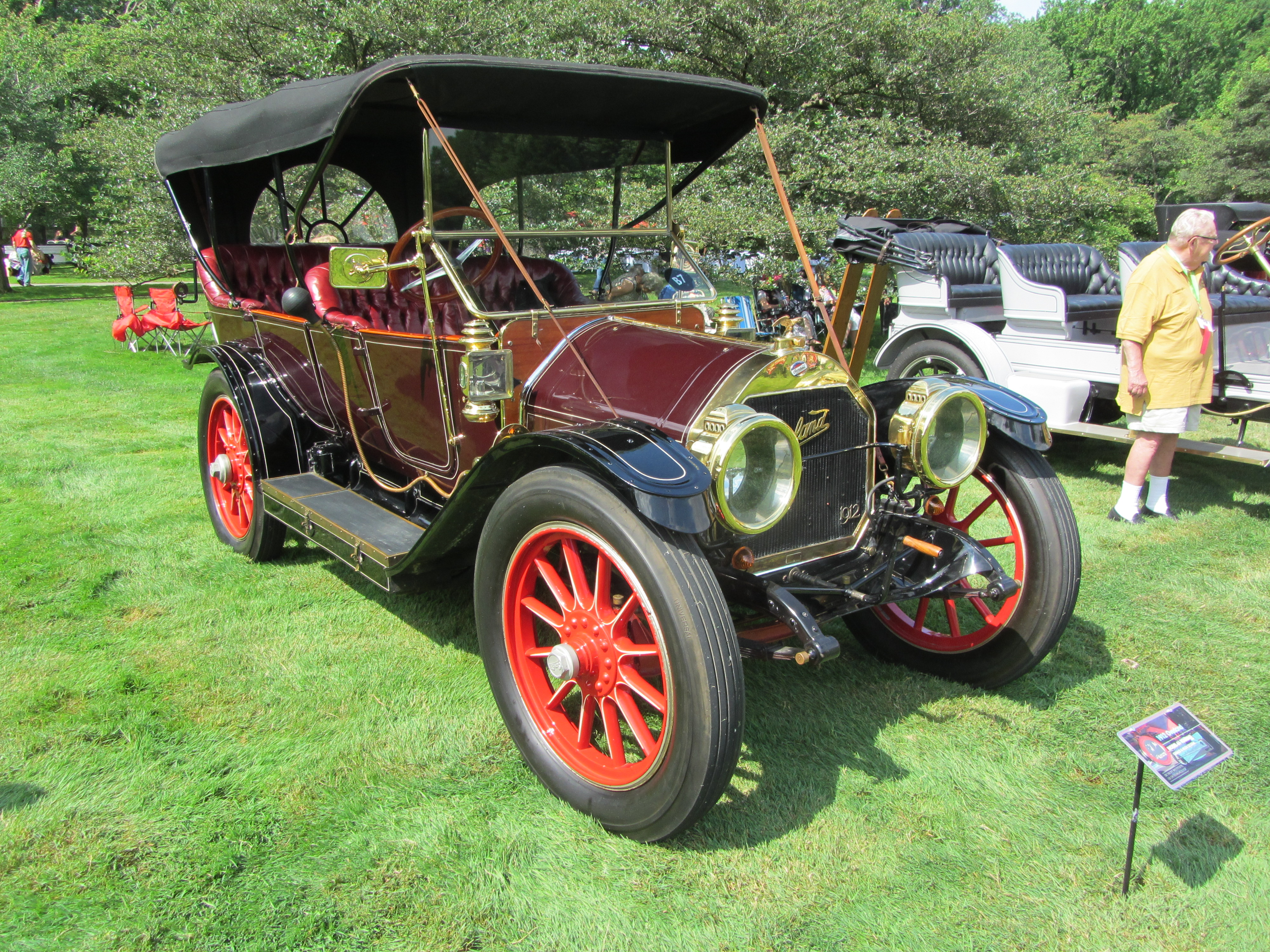 1912 Overland 59